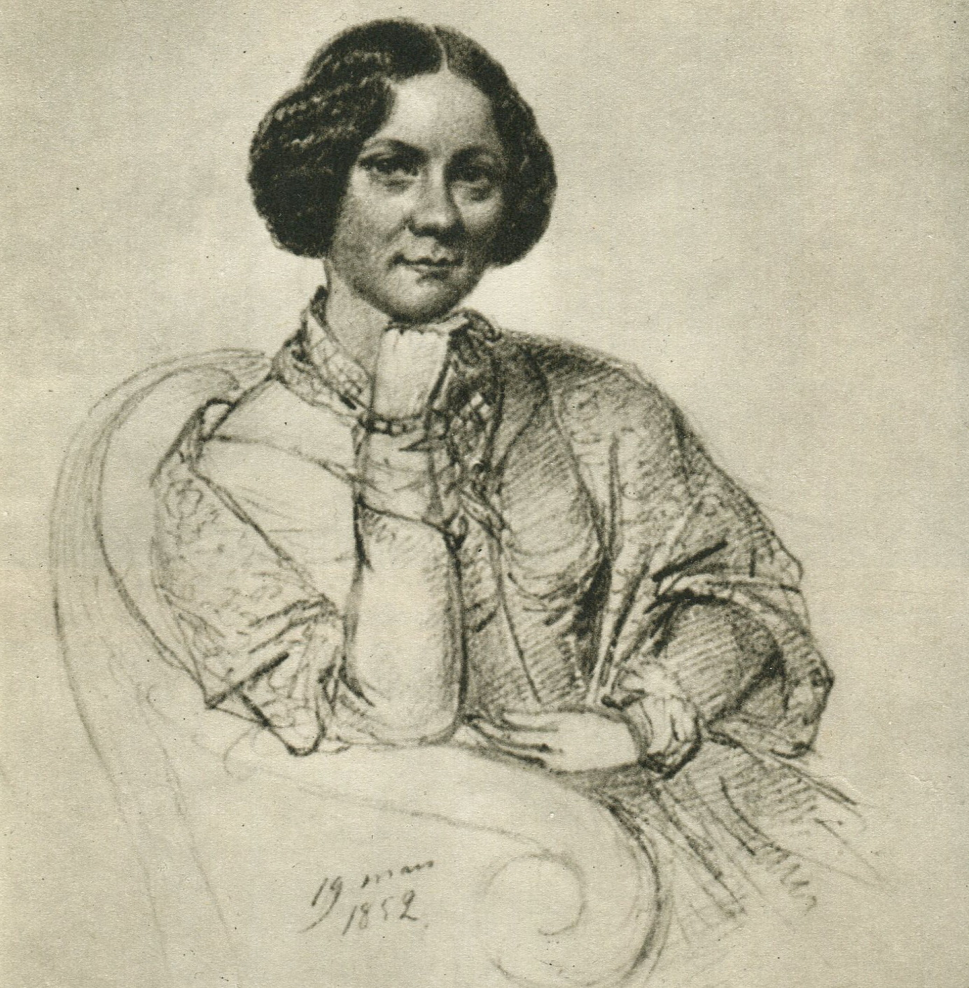 Louise Granberg 1852 (gift med Edvard Stjernström)